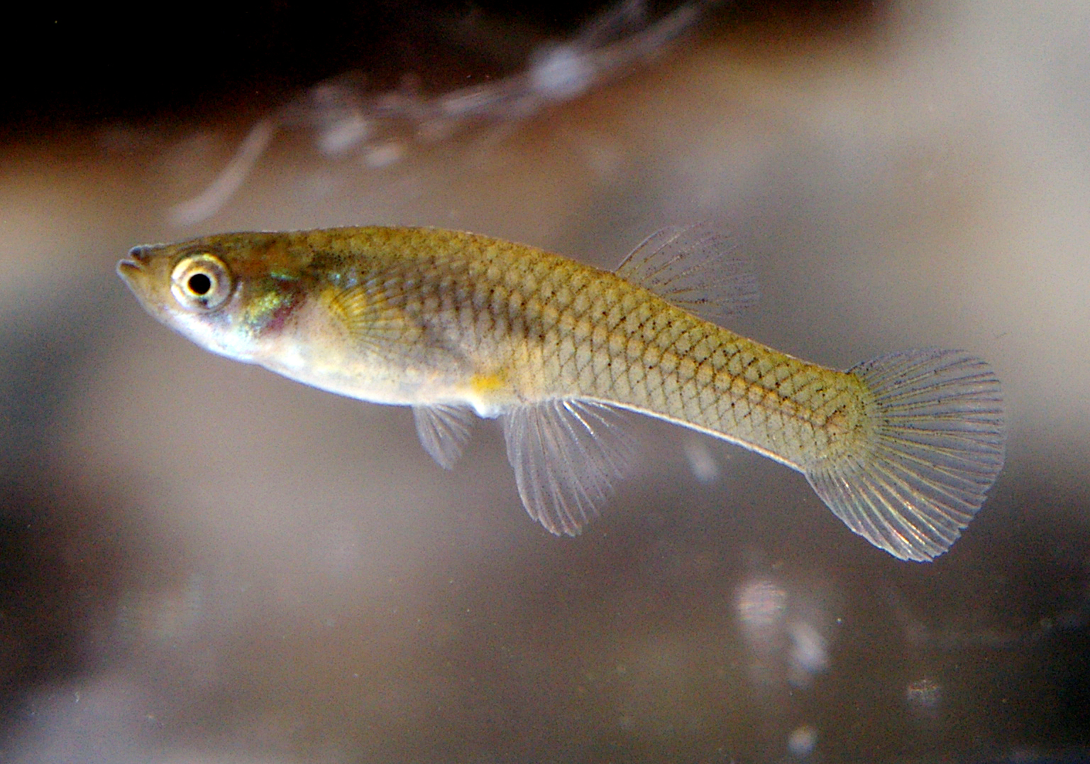 Gambusia affinis(Japanese name "Kadayashi")